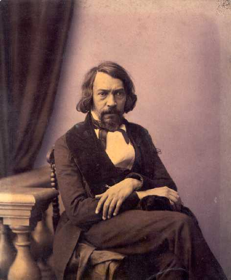 Алексей Степанович Хомяков. Фото конца 1850 гг.